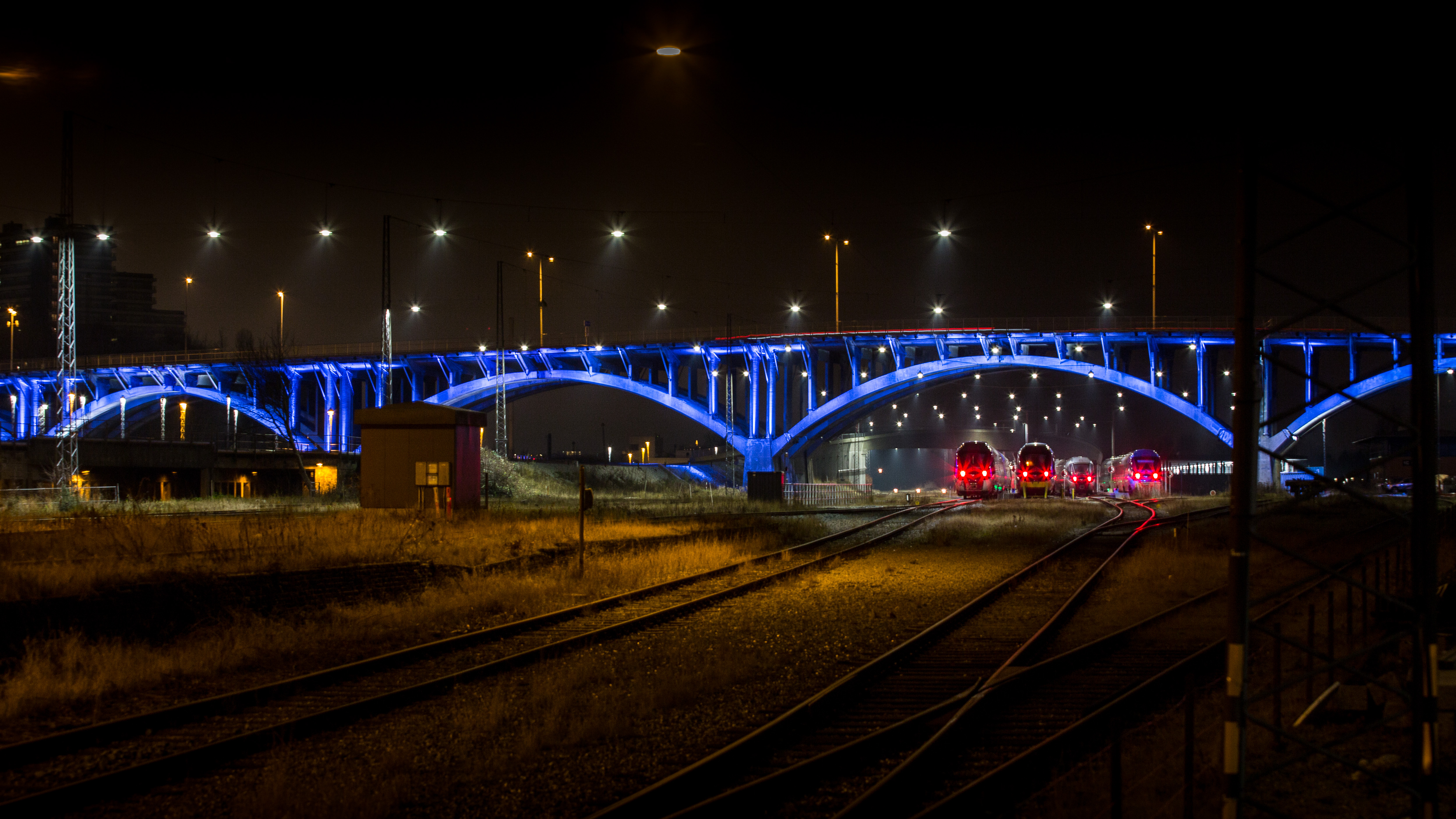 Hesitation of Light taget af Michael Harder